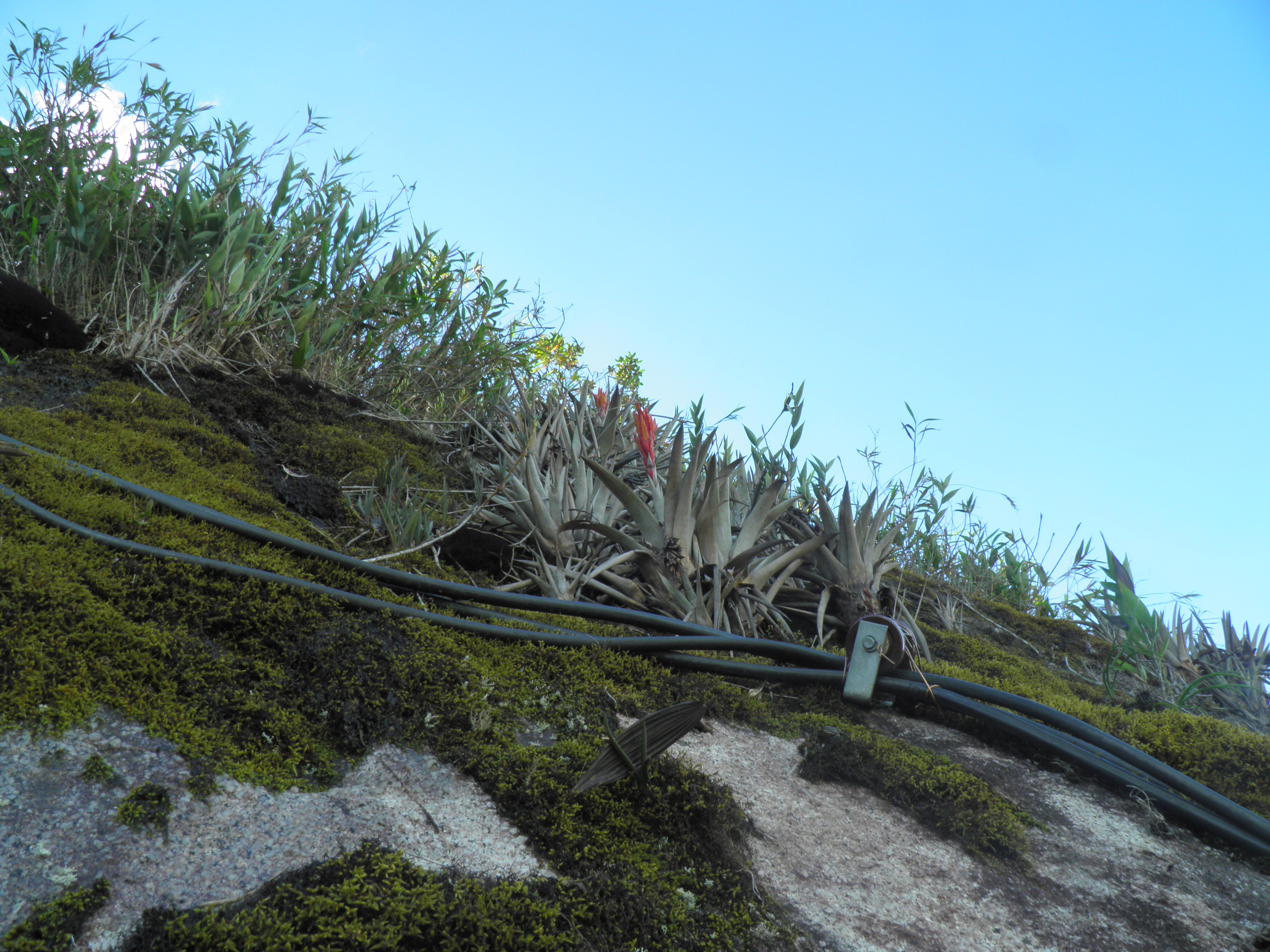 Tillandsia na skále El Penon de Guatapé